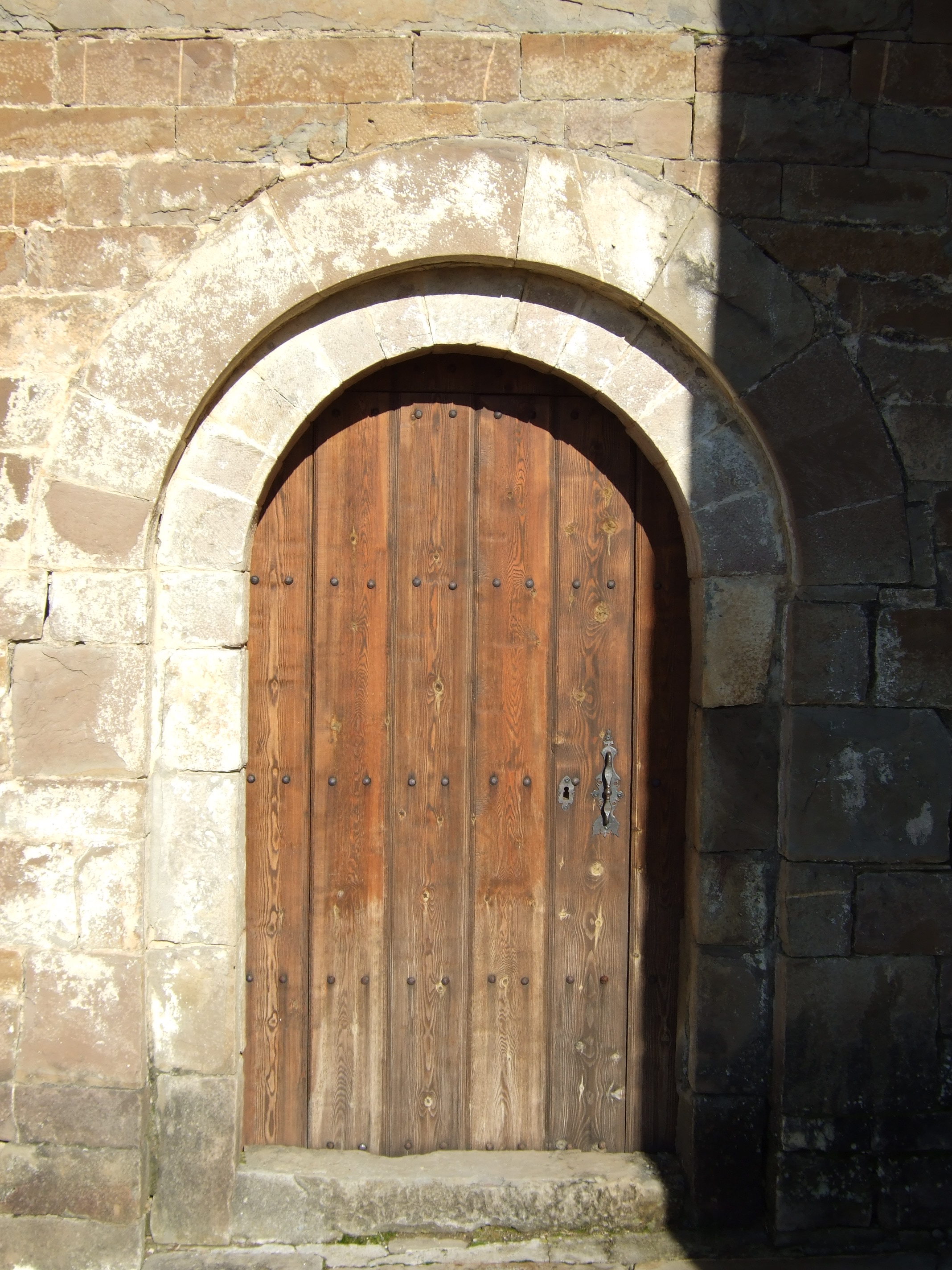 Satué - Iglesia de San Andrés, siglo XI - Portal